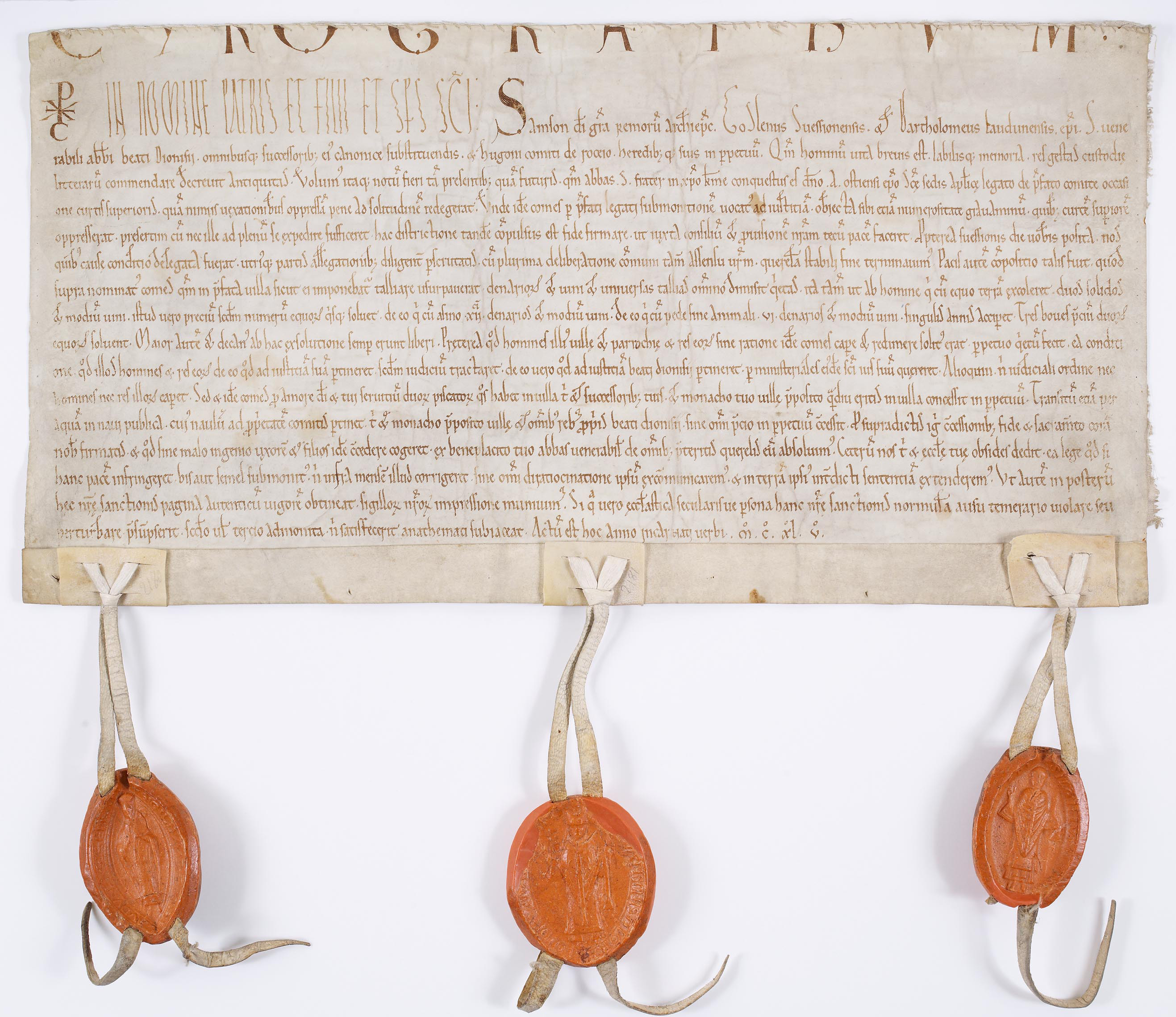 Accord passé entre Suger, abbé de Saint-Denis, et le comte de Roucy en présence de l'archevêque de Reims et des évêques de Laon et de Soissons, délégués du Saint-Siège, au sujet des exactions exercées par les gens du comte sur les terres de Saint-Denis à Concevreux. Acte sous forme de chirographe portant les sceaux des trois évêques, fait à Soissons, 1145.